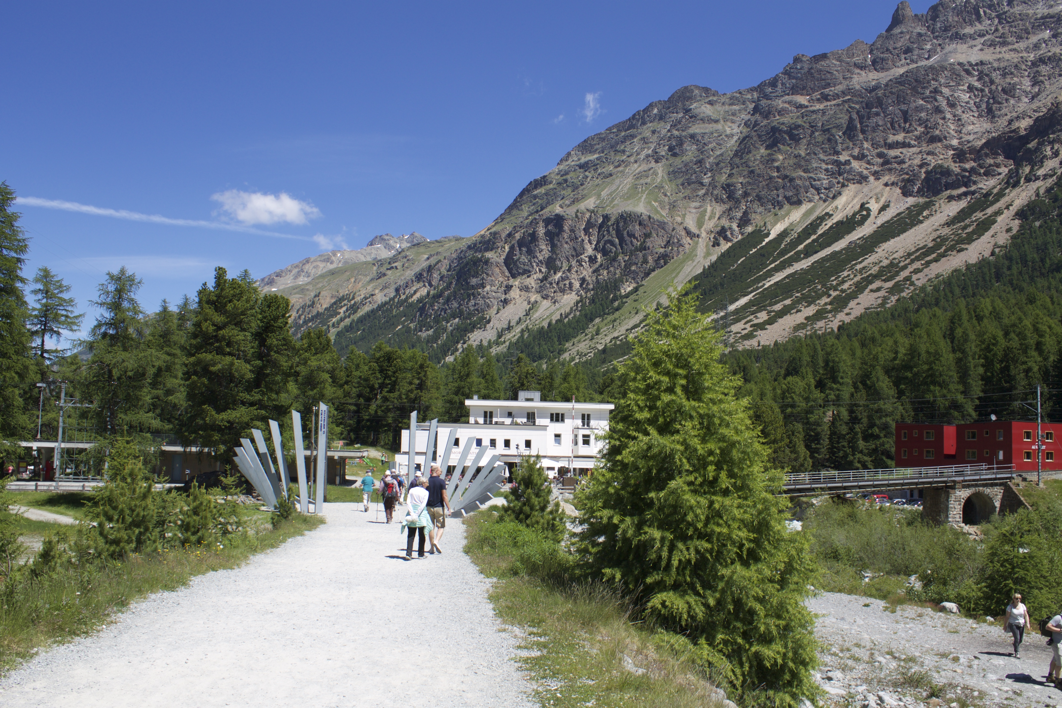 Vadret da Morteratsch